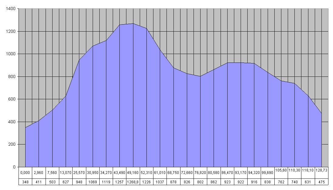 Profilo altimetrico della ferrovia Sulmona-Isernia